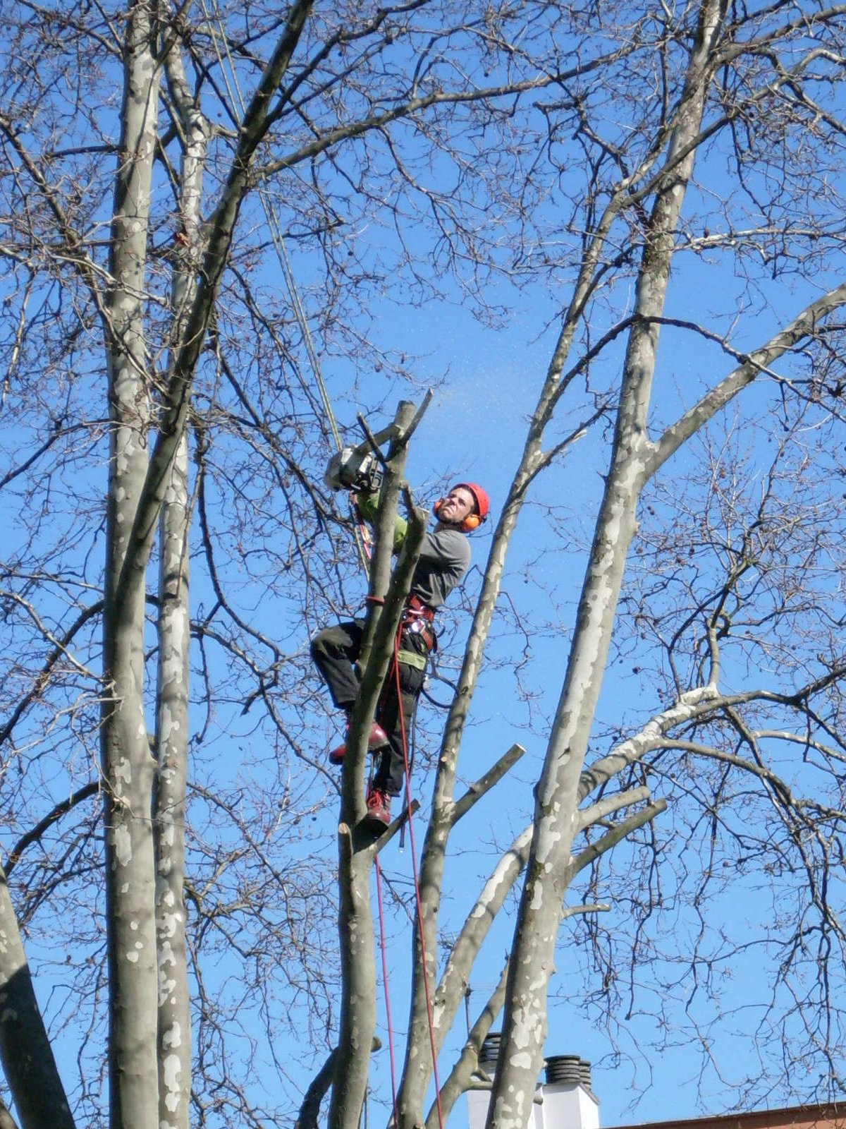 Élagueur au travail dans un platane à Toulouse